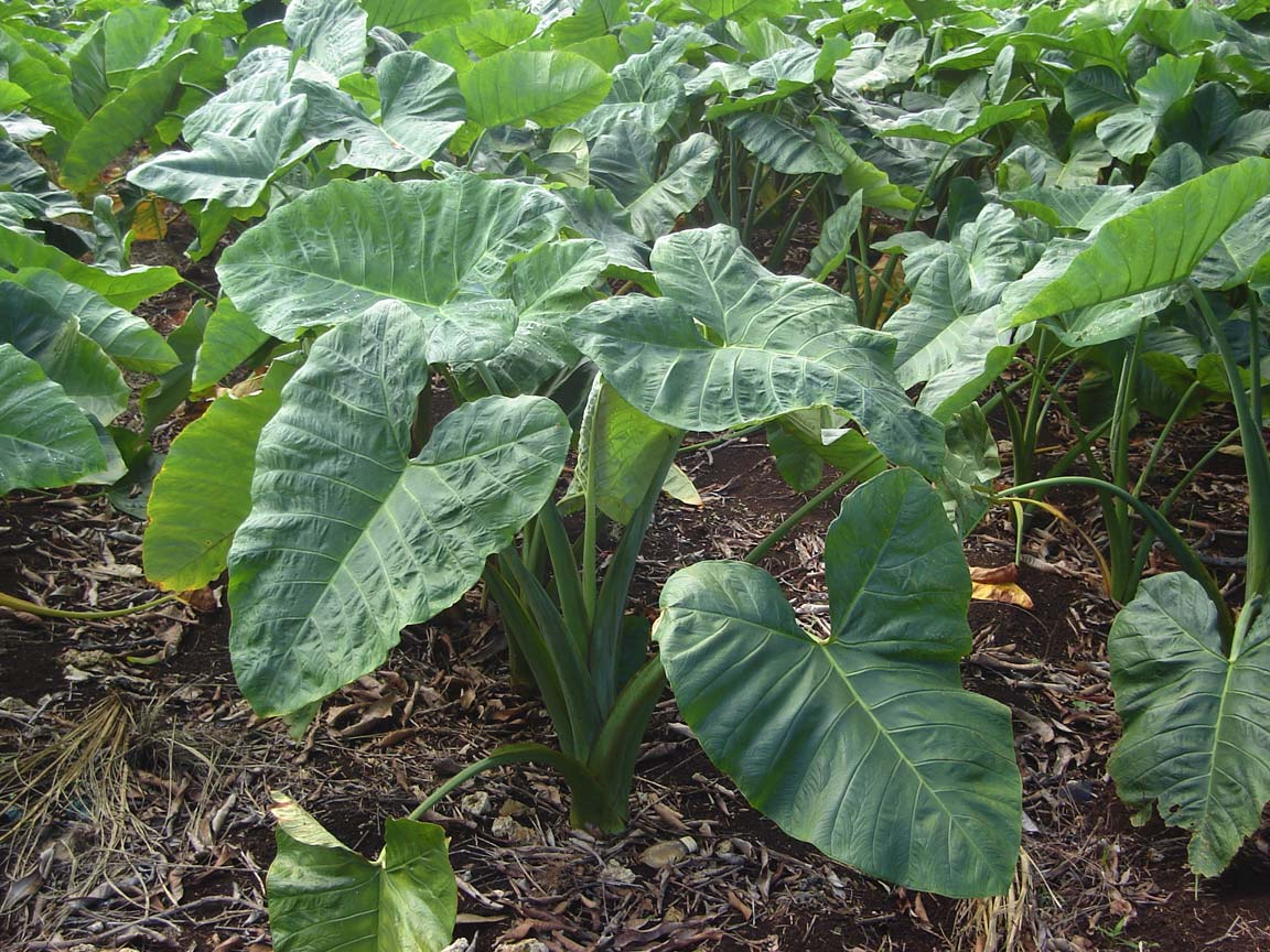 Xanthosoma sagittifolium (talo futuna) plantation on Tongatapu